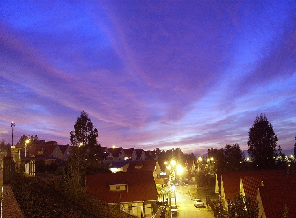 es verdad aquella parte del himno nacional que habla sobre un cielo azulado... ya sea despejado o nublado... en este caso las nubes forman una textura divina, muy similar a la seda. sector los pinos, quilpué, región de valparaíso, chile.